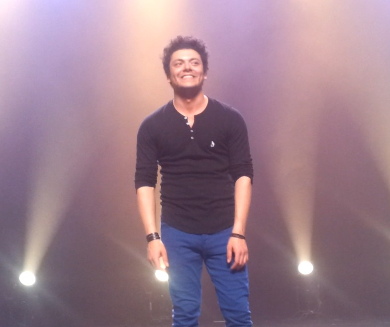 Kev Adams sur scène en 2013 lors du "Test ... Voilà Voilà"